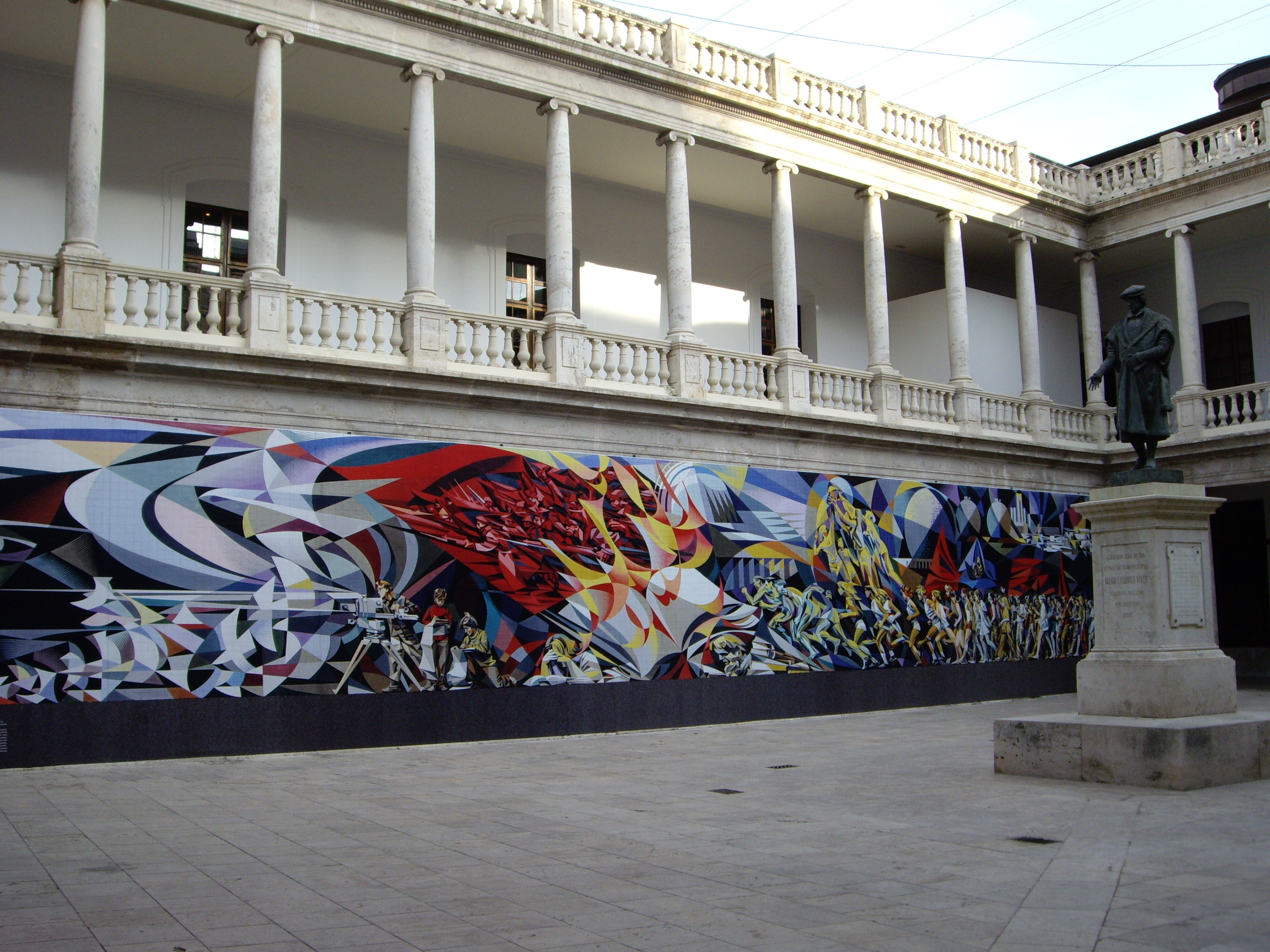 Claustre de la Nau (Universitat de València) durant l'exposició de Josep Renau.